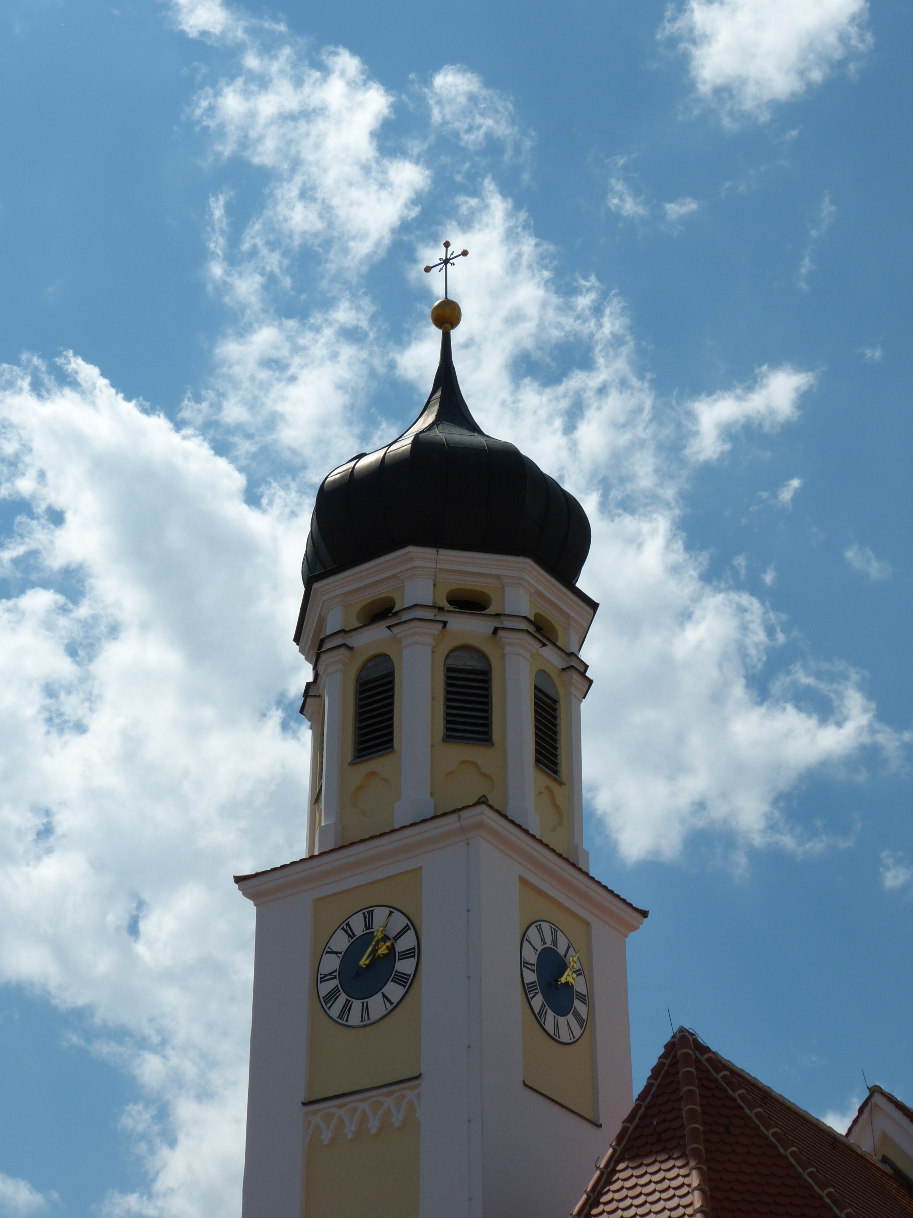 St. Johannes Baptist, Salgen, Landkreis Unterallgäu, Bayern